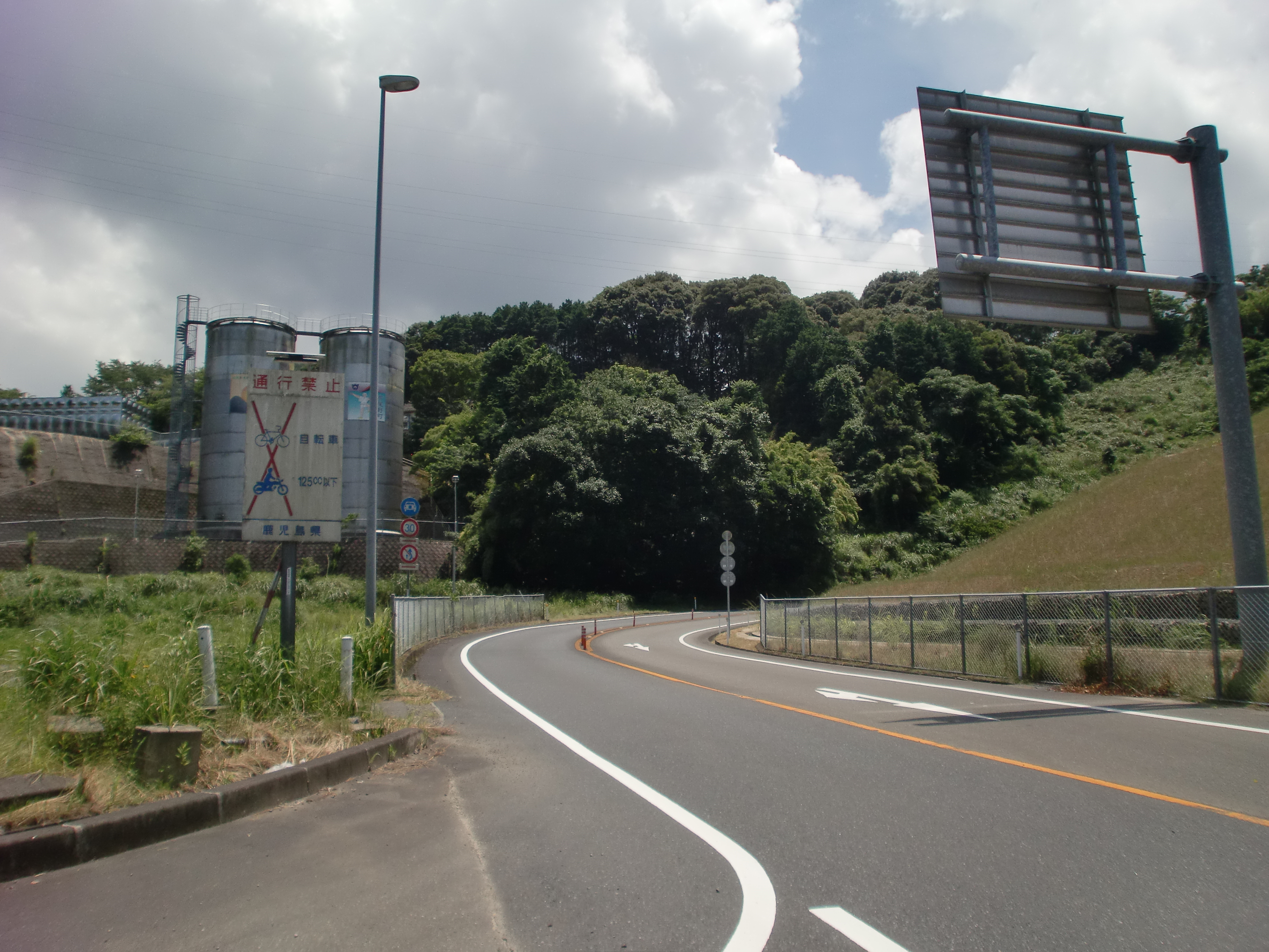 高尾野インターチェンジの鹿児島空港方面出入口